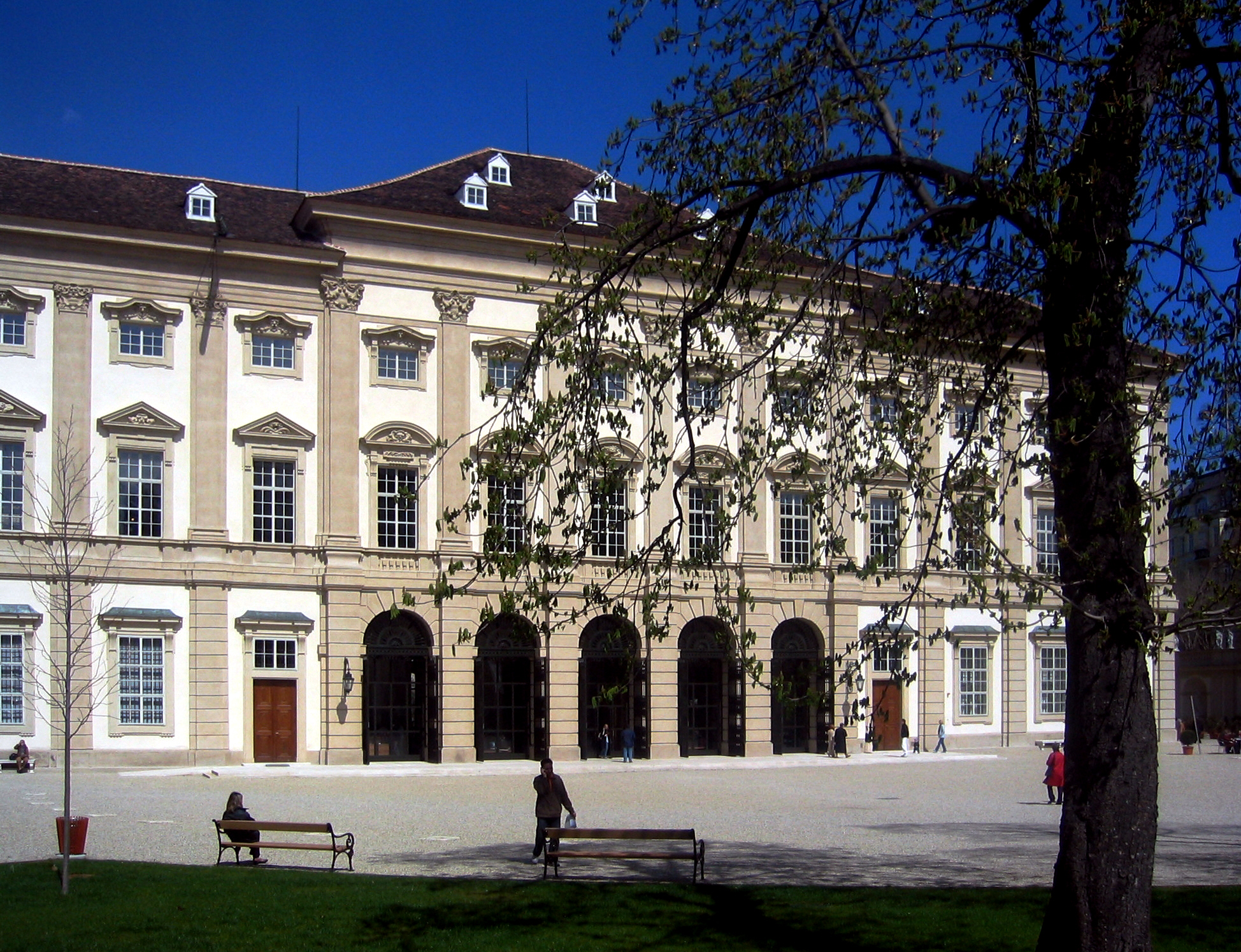 Vienna, Austria (Alsergrund borough). Palais Liechtenstein, home to the Liechtenstein Museum